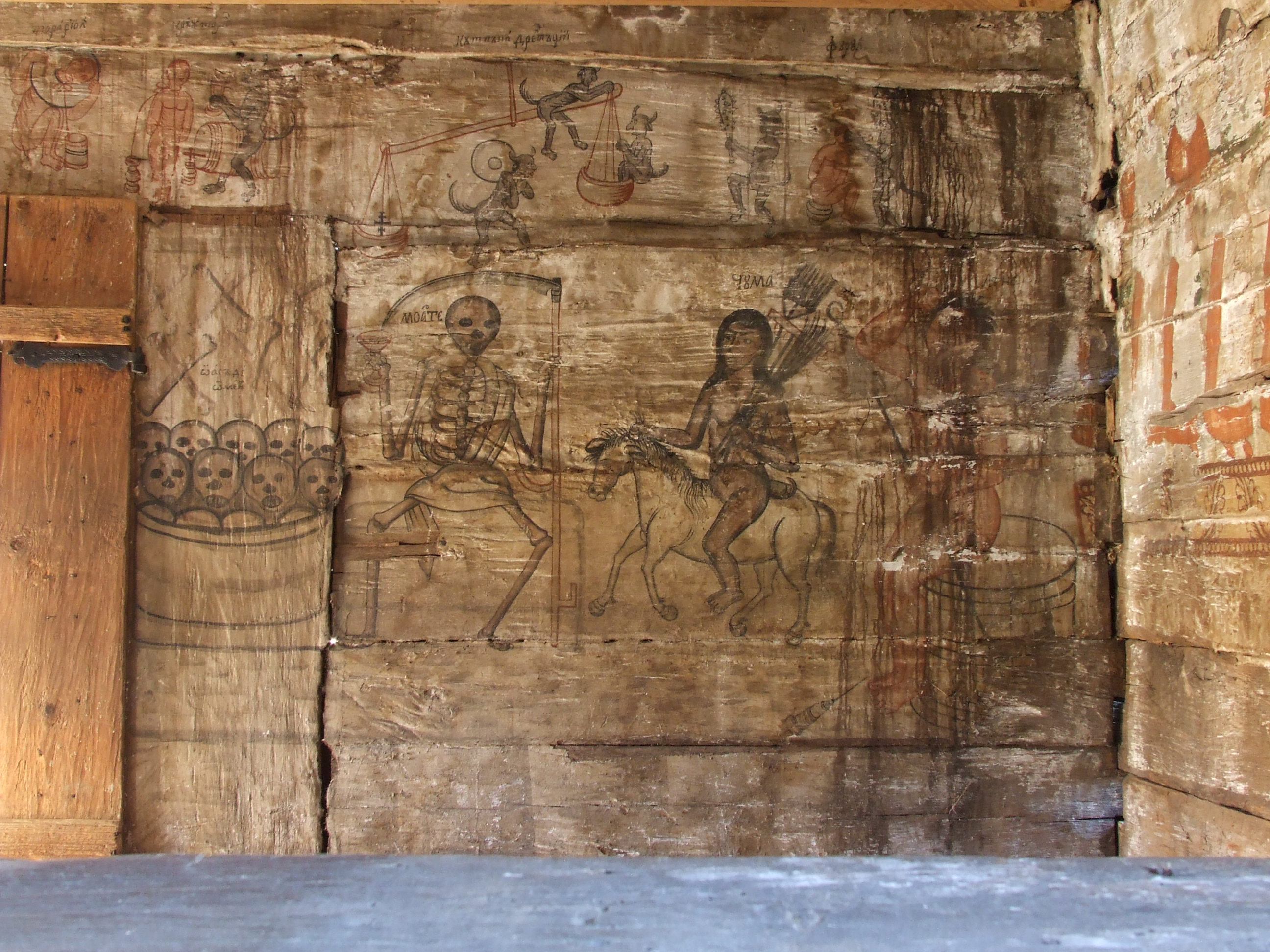 Biserica de lemn din Corund, judeţul Satu Mare. Pictură din pronaos.